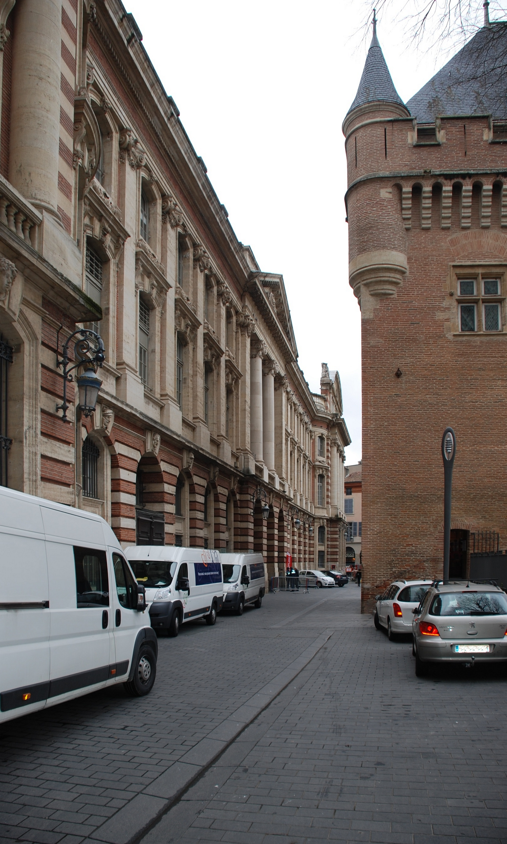 Rue Ernest Roschach (1837-1909) à Toulouse. La plaque portant le nom de la rue mentionne une date de décès erronée (1907 au lieu de 1909). Le palais du Capitole est à droite, le Donjon ou tour des Archives, aujourd'hui Office du tourisme de Toulouse, est à droite